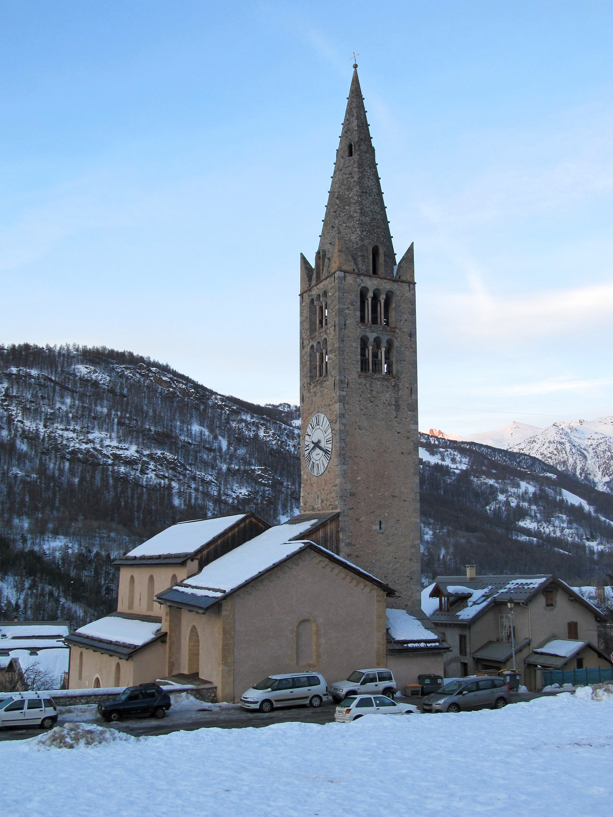 Saint-Chaffrey: l'église